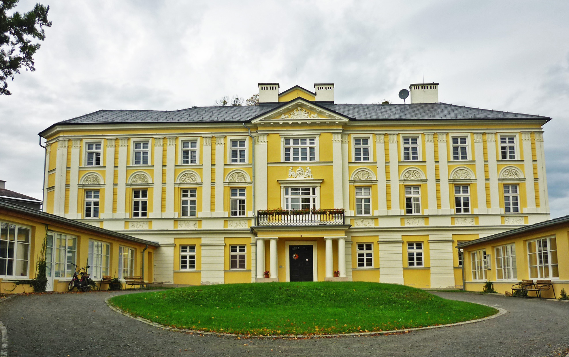 Villa Loreto in Fulnek